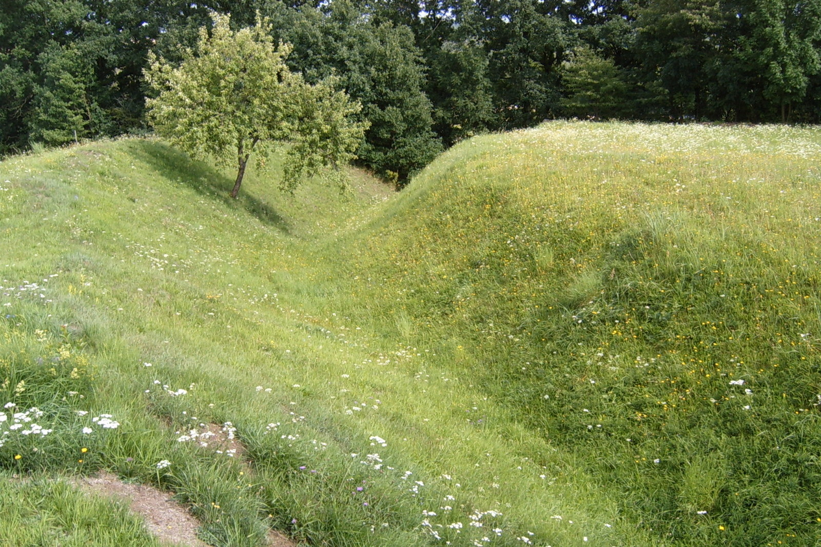 Skalice – hradní příkop na východní straně